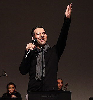 احسان بیرقدار کنسرت ساکن روان٬ برج آزادی تهران ۱۷ اسفند ۱۳۹۶